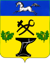 Герб села Ковалевское Новокубанского района Краснодарского края